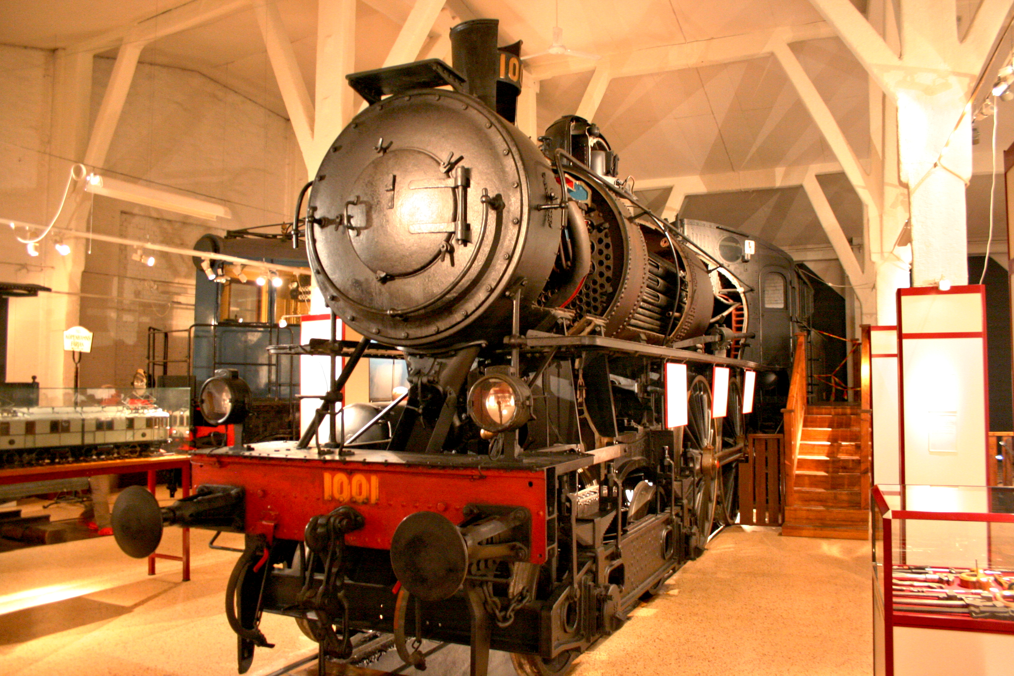 Dampflokomotive A 1001 im Eisenbahnmuseum Gävle 13.08.08